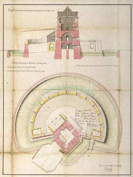 Plan et coupe de la Tour Dorée. Convention de représentation : les éléments existants sont pochés en vieux rose, les éléments en projet sont pochés en jaune.